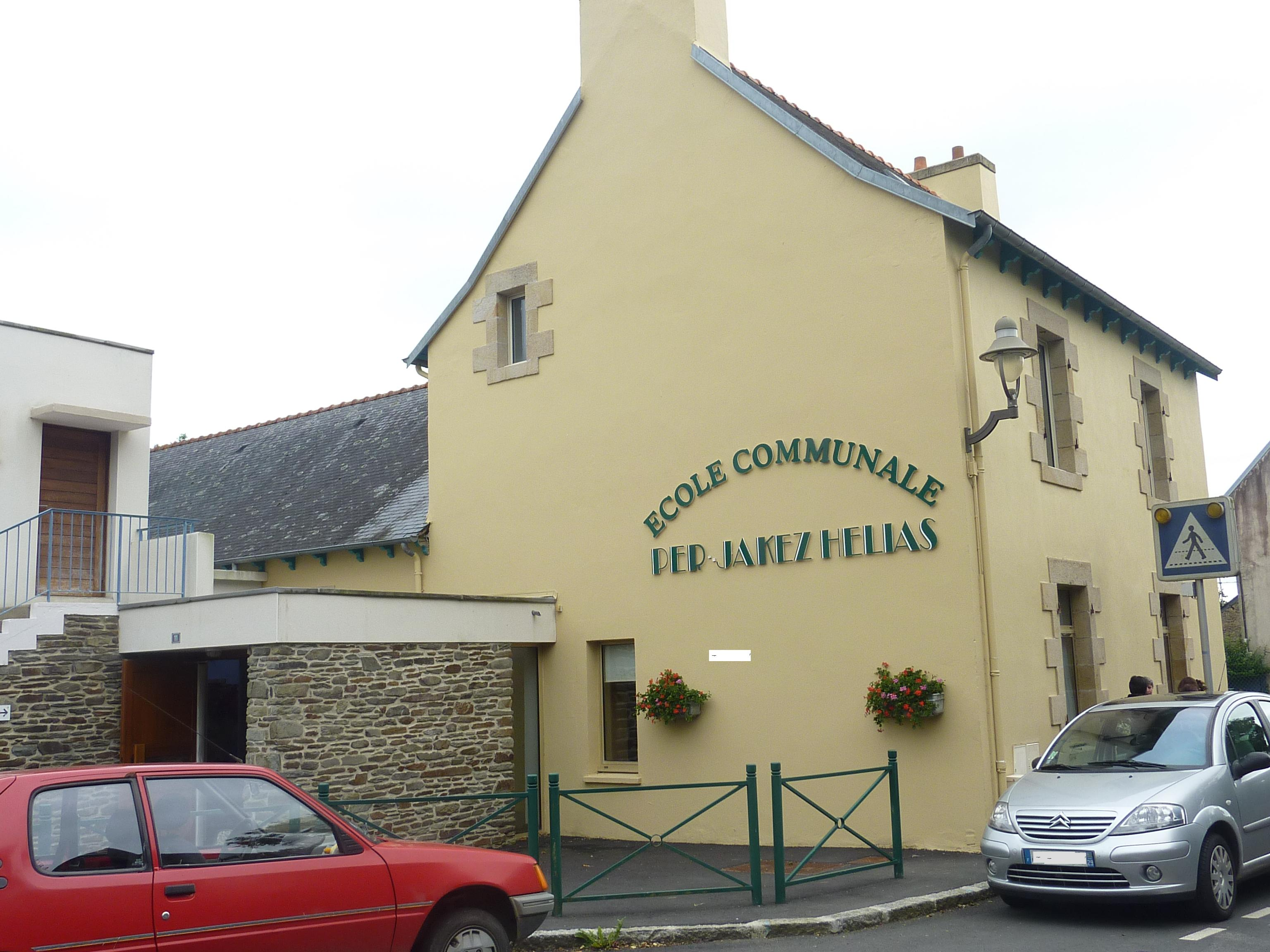 Cléden-Poher : l'école publique Per Jakez Hélias